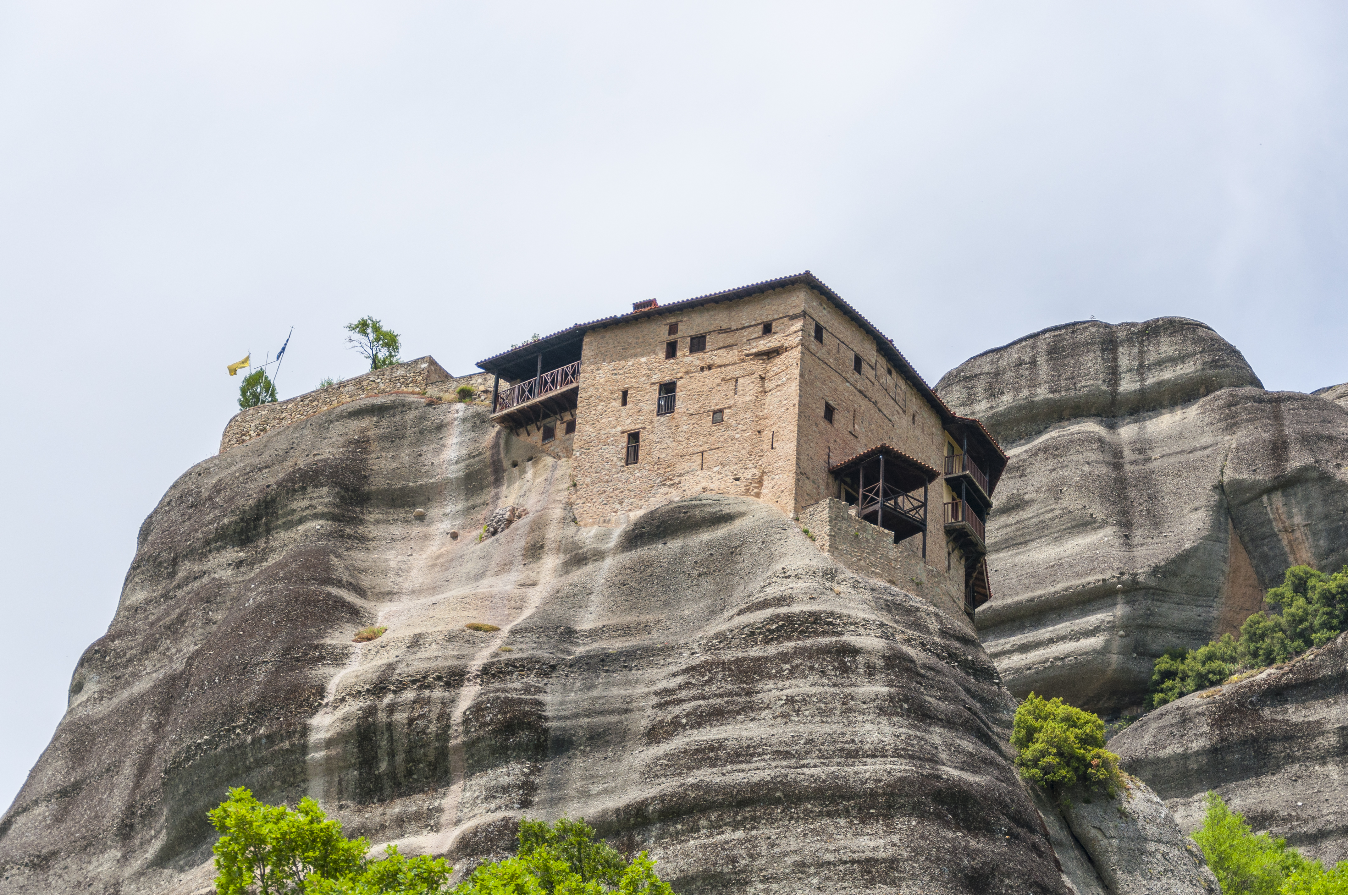 Μονή Αγίου Νικολάου Αναπαυσά Μετεώρων«Μονή Αγίου Νικολάου Αναπαυσά Μετεώρων»